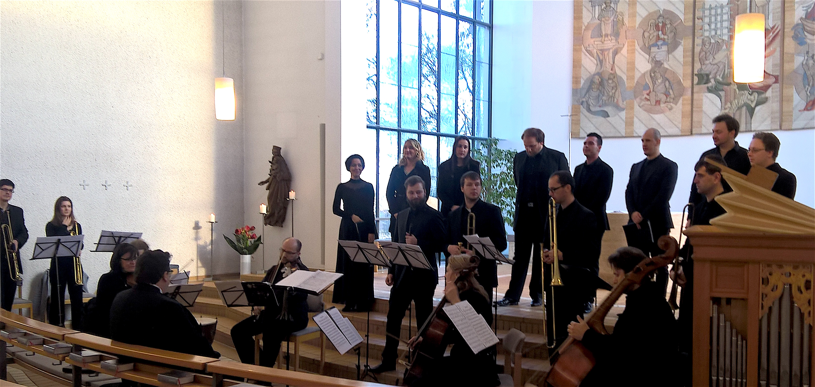 Das Ensemble Musica Figuralis aus Ölmütz (Olomouc) in der Kath. Pfarrkirche St. Peter und Paul in Gerlingen, Konzertmatinée, Missa in C von Maurus Haberhauer am 11.Dezember 2016.